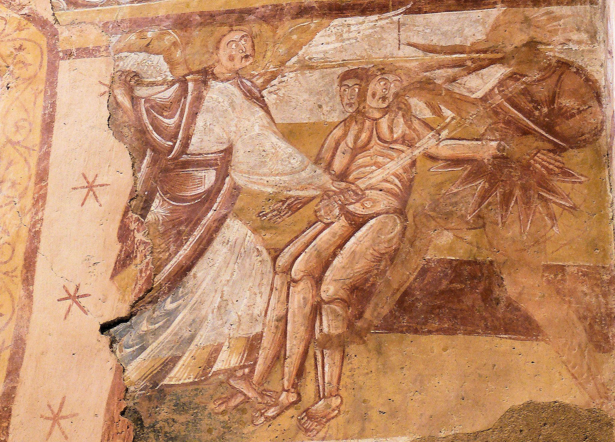 Adam et Ève protégés par un ange au paradis